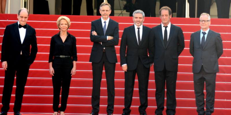 Pierre Lescure, Frédérique Bredin, Christophe Rossignon, Stéphane Brizé, Vincent Lindon et Thierry Frémaux lors de la présentation du film "La Loi du marché" au festival de Cannes